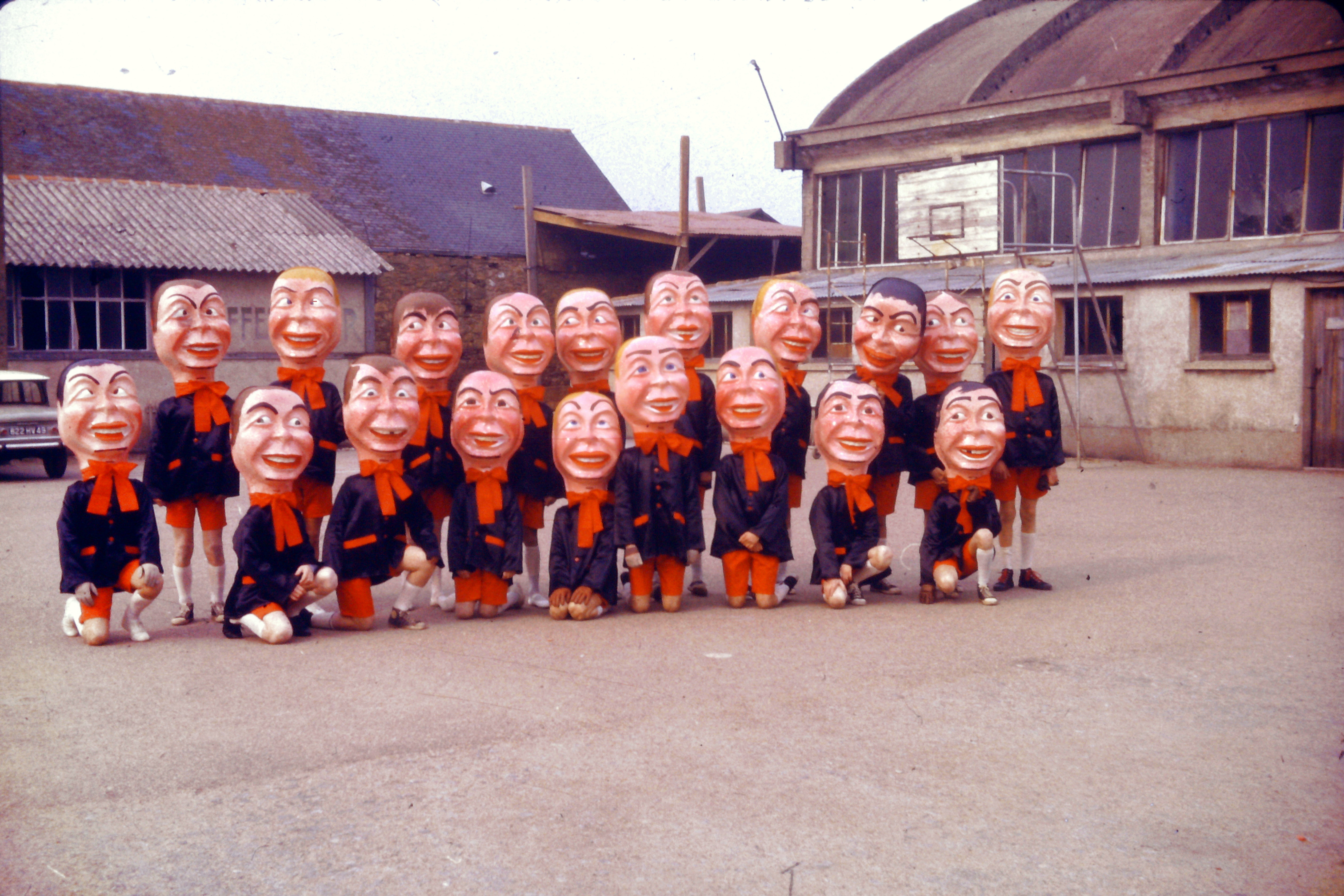 Groupe de grosses têtes (mi-carême de Cholet 1964)